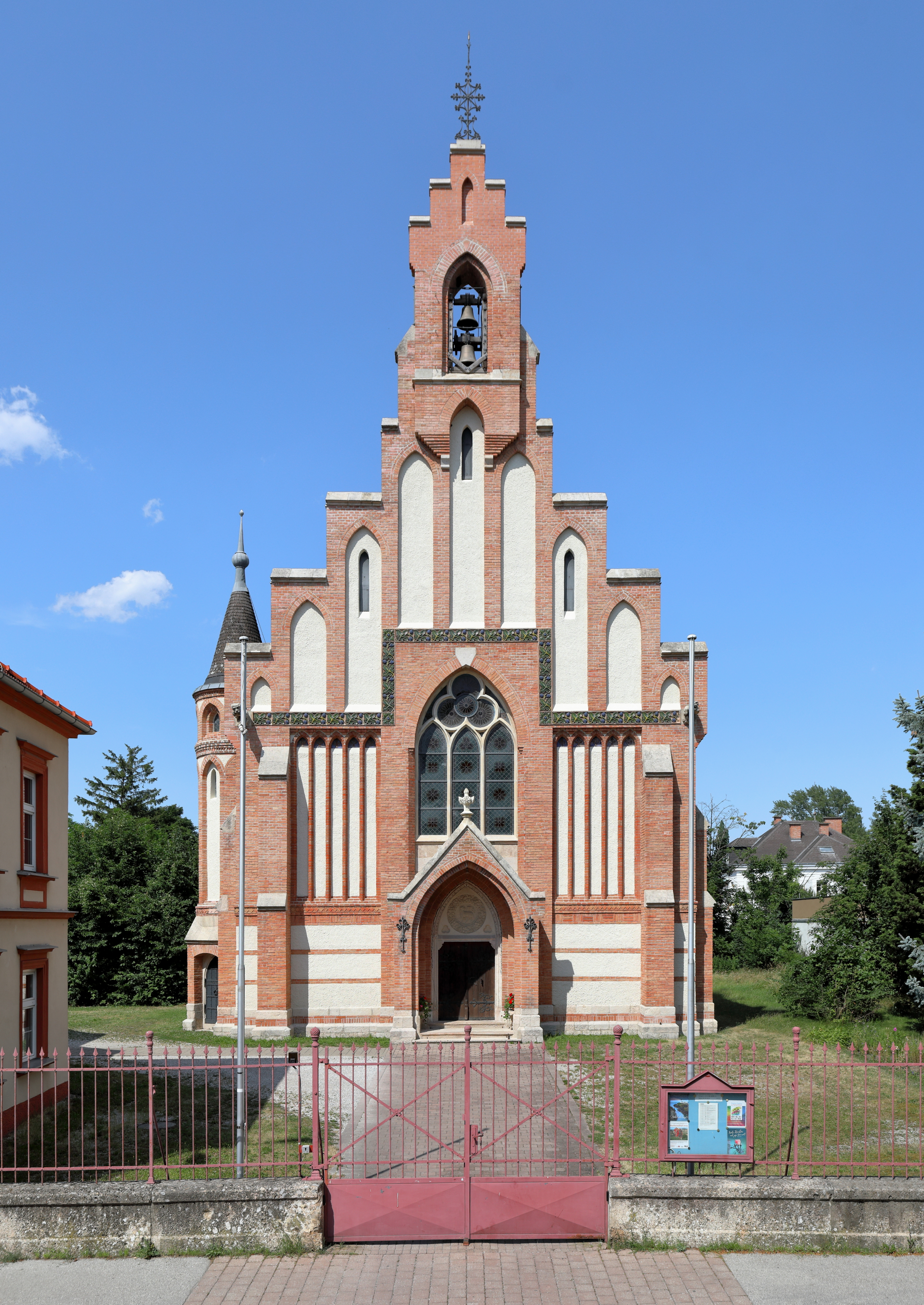 Südwestansicht der evangelischen Pfarrkirche in der niederösterreichischen Stadtgemeinde Neunkirchen. Der Backsteinbau im neugotischen Stil wurde 1862/63 nach Plänen des Wiener Architekten Hans (Johann) Petschnig (* 1821) errichtet.